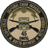 Нарукавний знак, 45 окремий моторизований піхотний батальйон